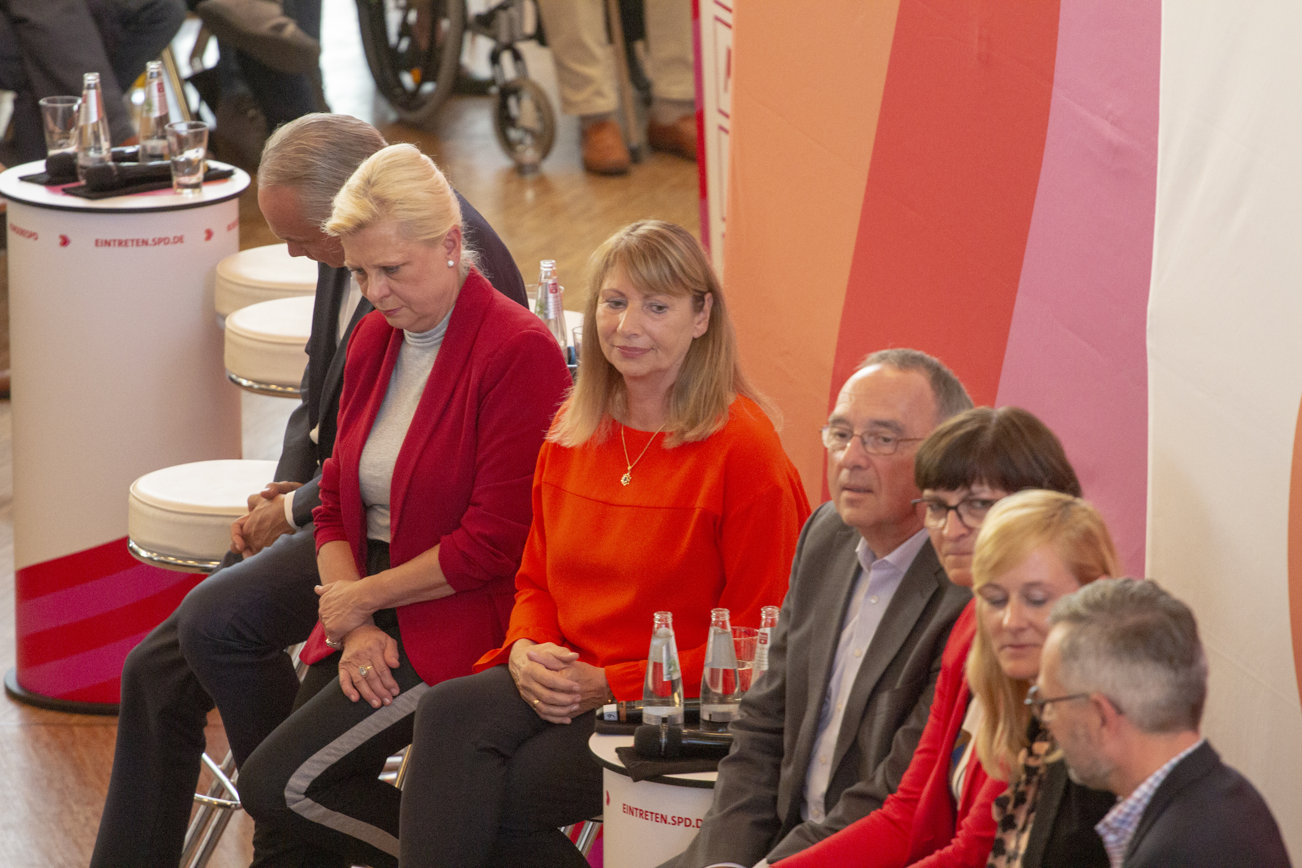 SPD Regionalkonferenz zur Wahl des SPD-Vorsitzes am 10. September 2019 in Nieder-Olm.